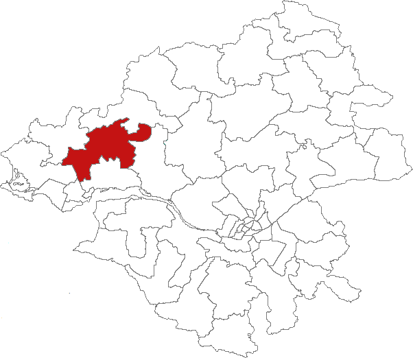 Carte de localisation du canton de Pontchâteau (France, Loire-Atlantique)